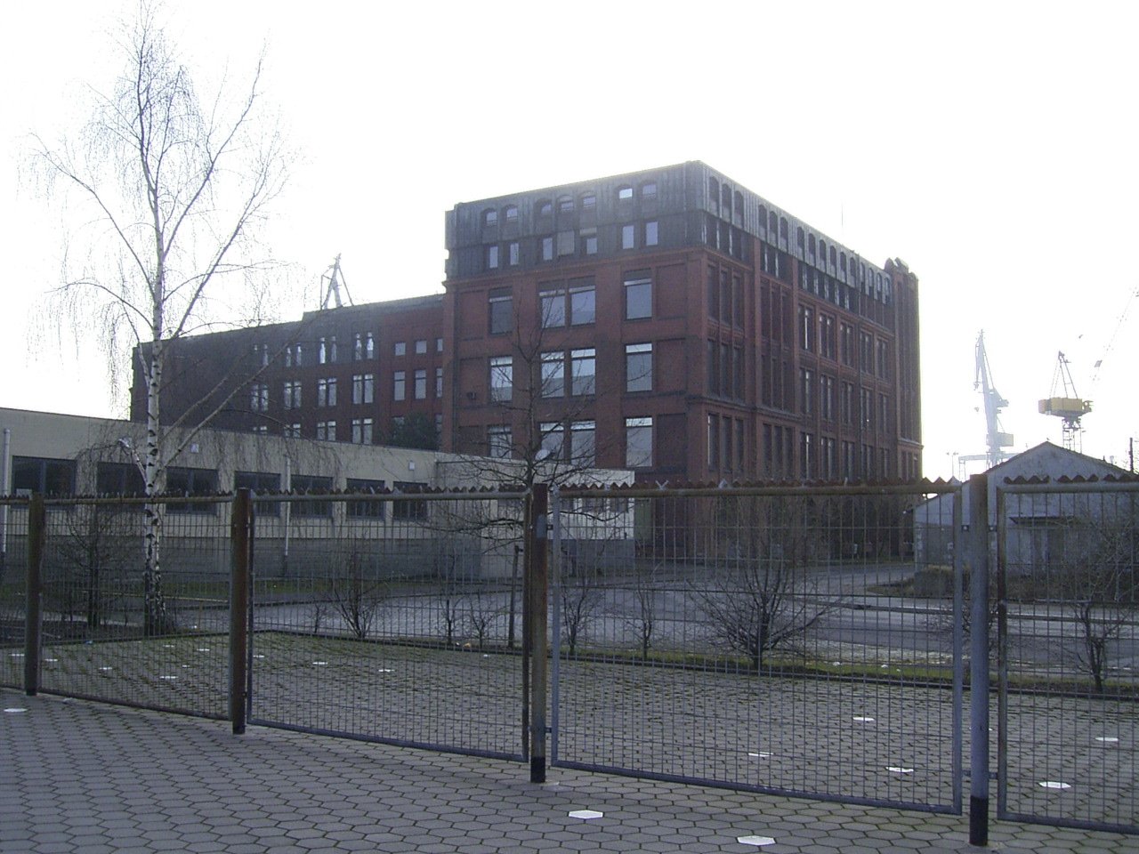 Das Verwaltungsgebäude der Werft Blohm + Voss in der Hermann-Blohm-Straße auf Steinwerder wurde 1908 erbaut und zwischen 1977 und 1981 durch die Architekten Schramm, Pempelfort und von Bassewitz modernisiert.